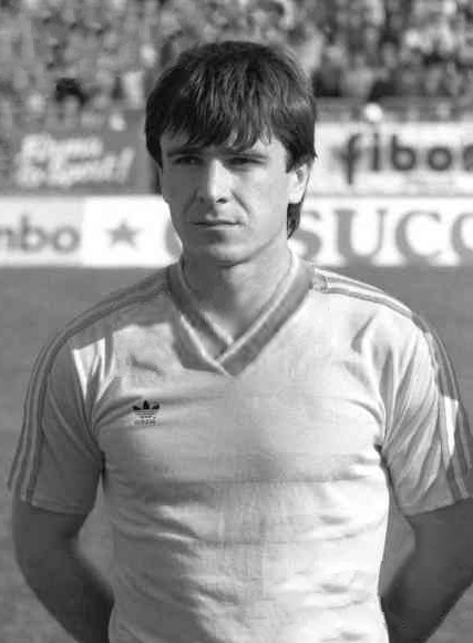 Dorin Mateuț in Bucharest